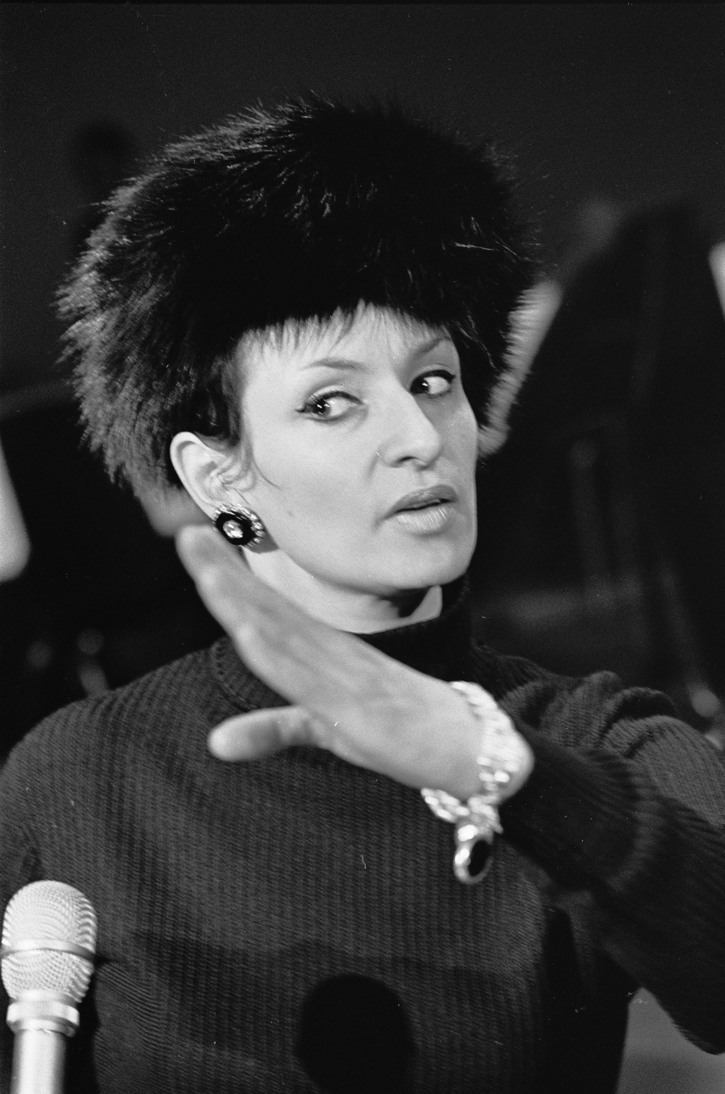 Barbara tijdens repetities voor het Grand Gala du Disque Populaire 1968